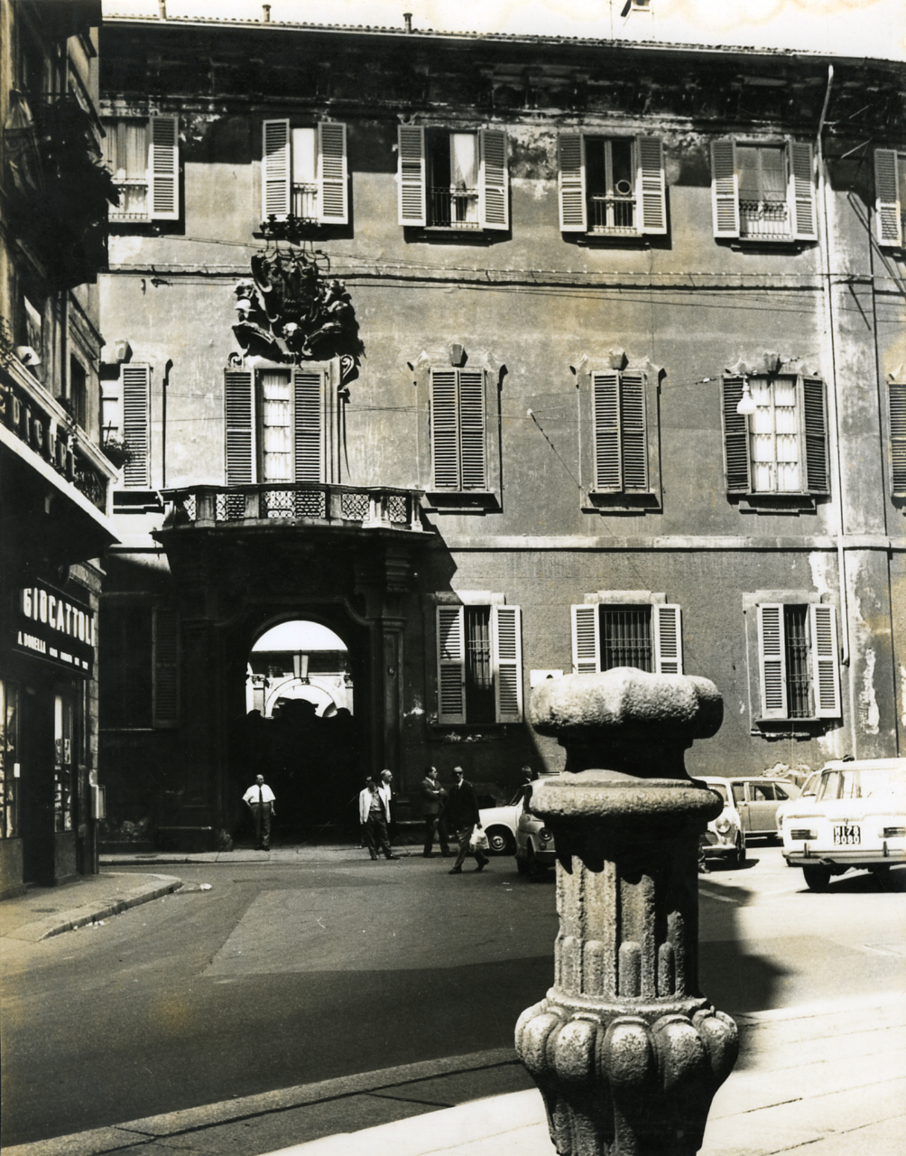 Servizio fotografico : Milano, 1970 / Paolo Monti. - Stampe: 3 : Positivo b/n, gelatina bromuro d'argento/ carta, 18x24, 24x30. - ((Al verso delle stampe manoscritti i numeri dei negativi corrispondenti: 2276/6, 12959. Sul coperchio della scatola manoscritto a pennarelo: "Milano Monumenti"